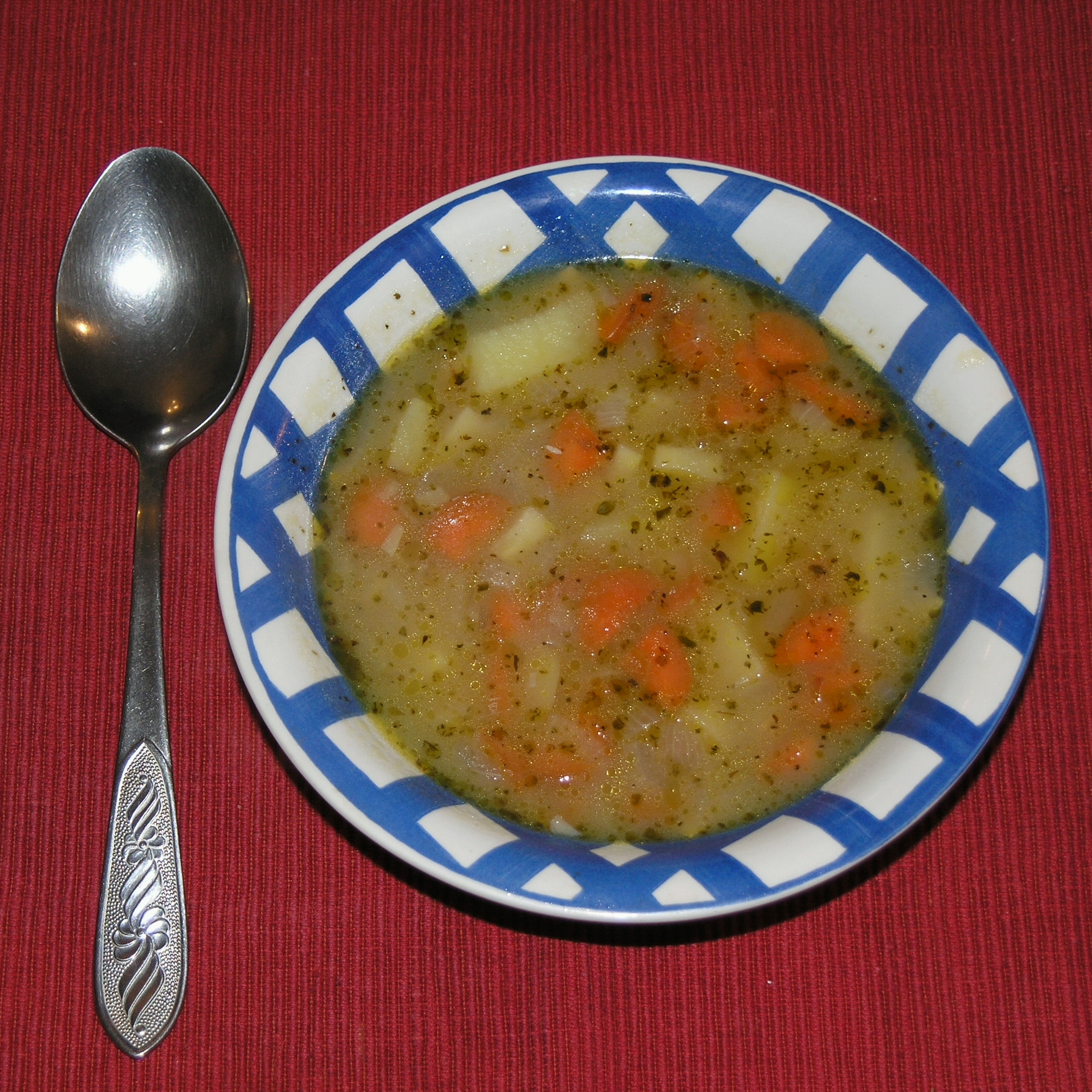 Bramborová polévka